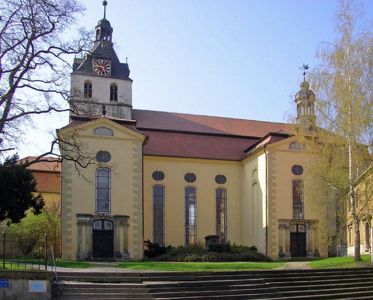 Schlosskirche Nordansicht